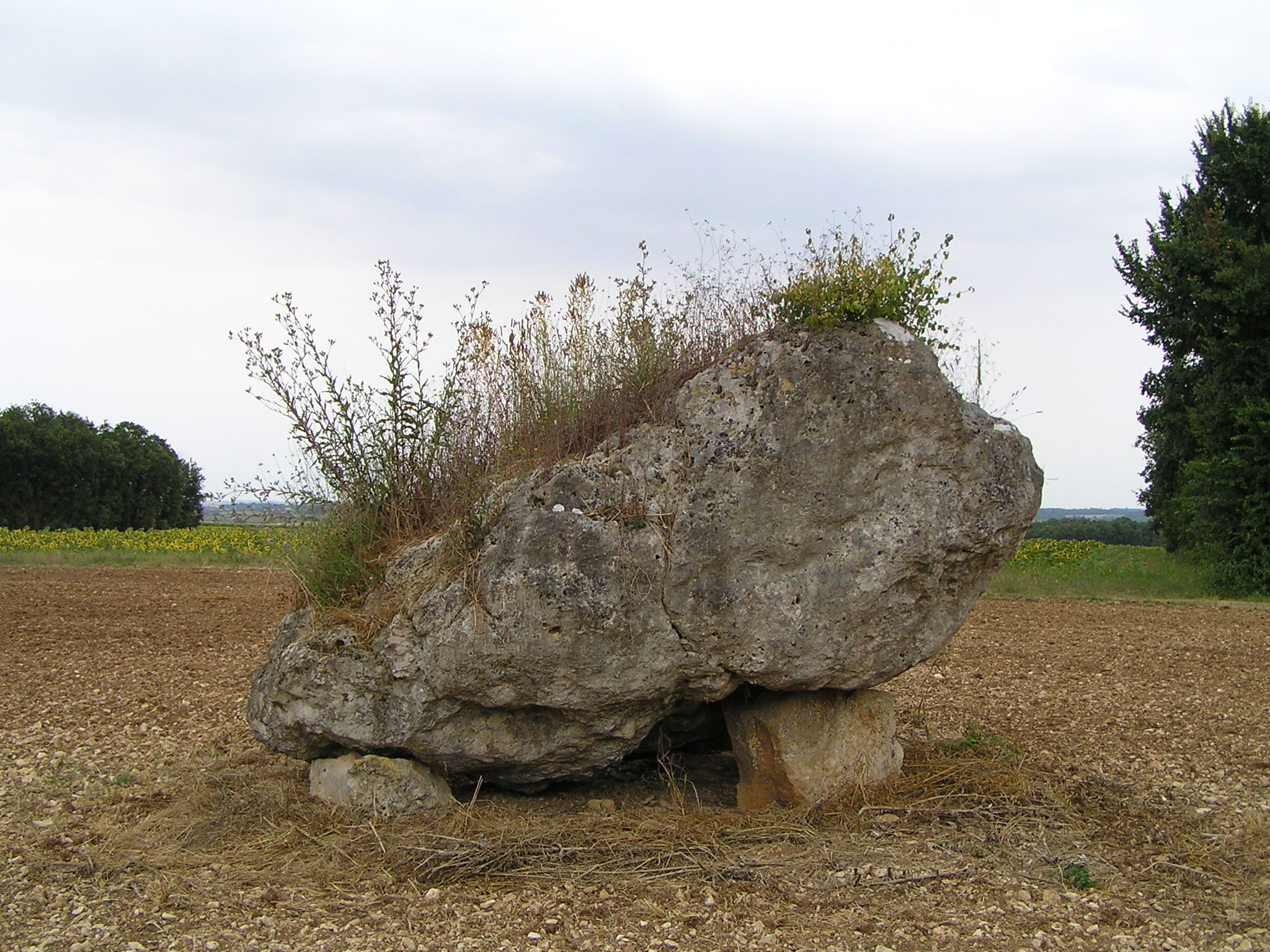 dolmen de la pierre blanche à Bessé, Charente, France